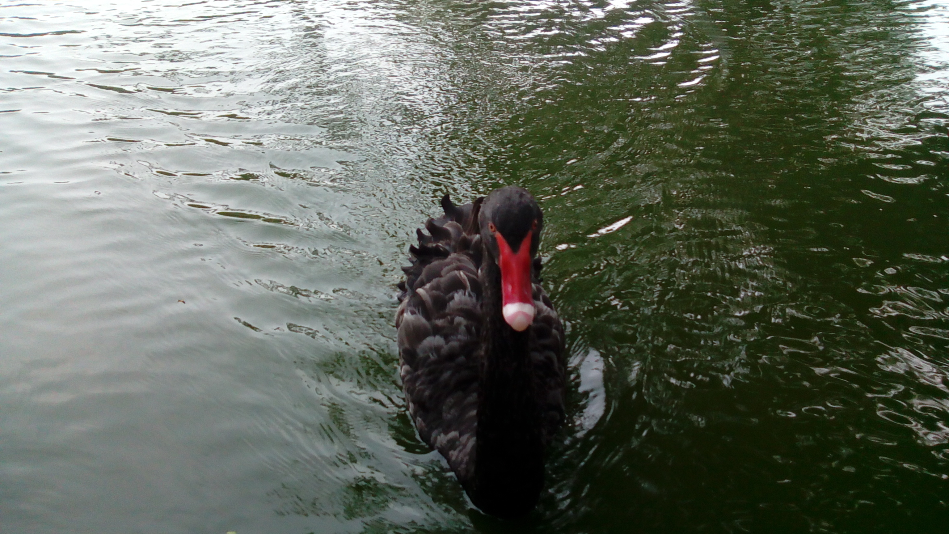 同上